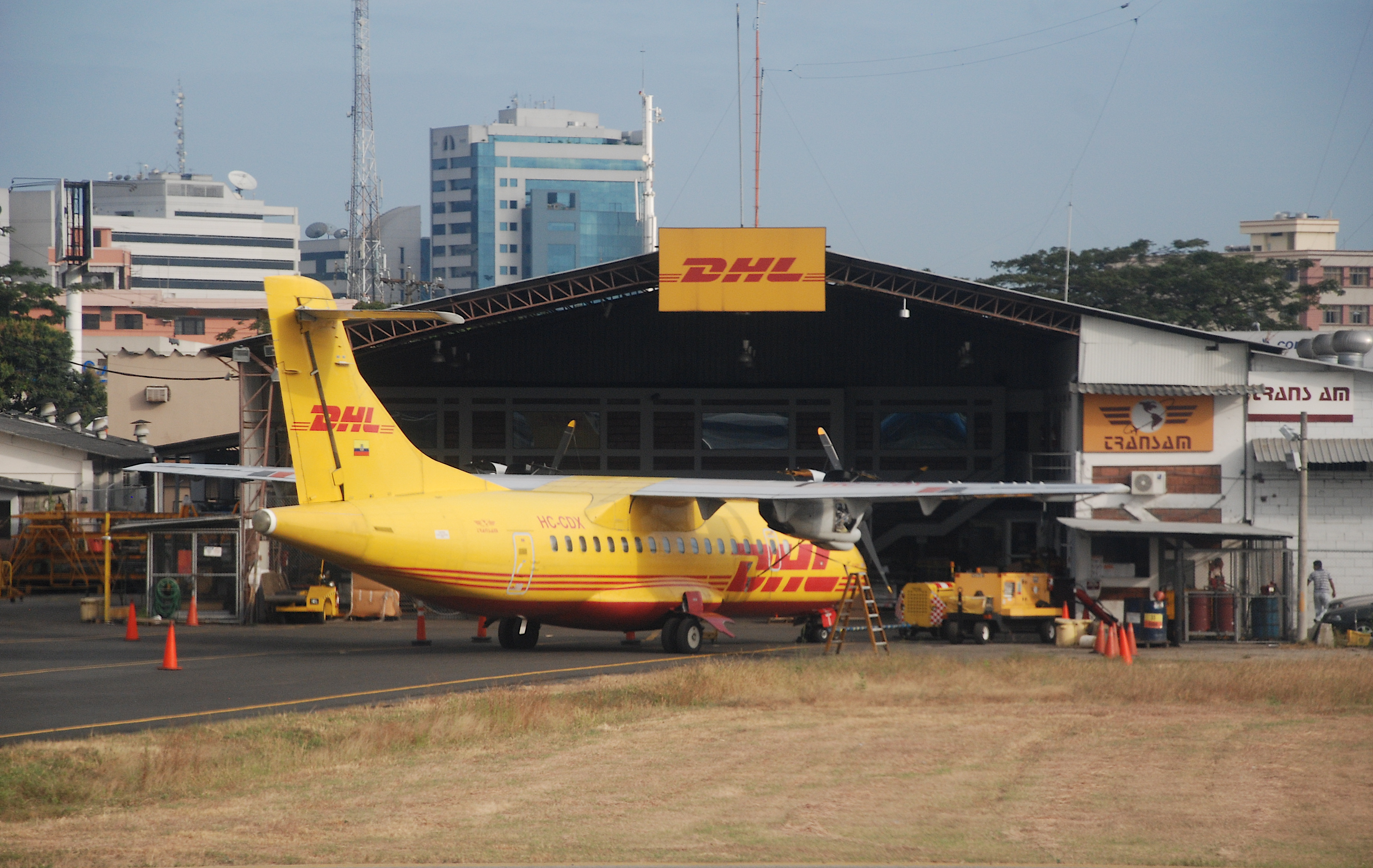 HC-CDX@GYE;26.06.2008